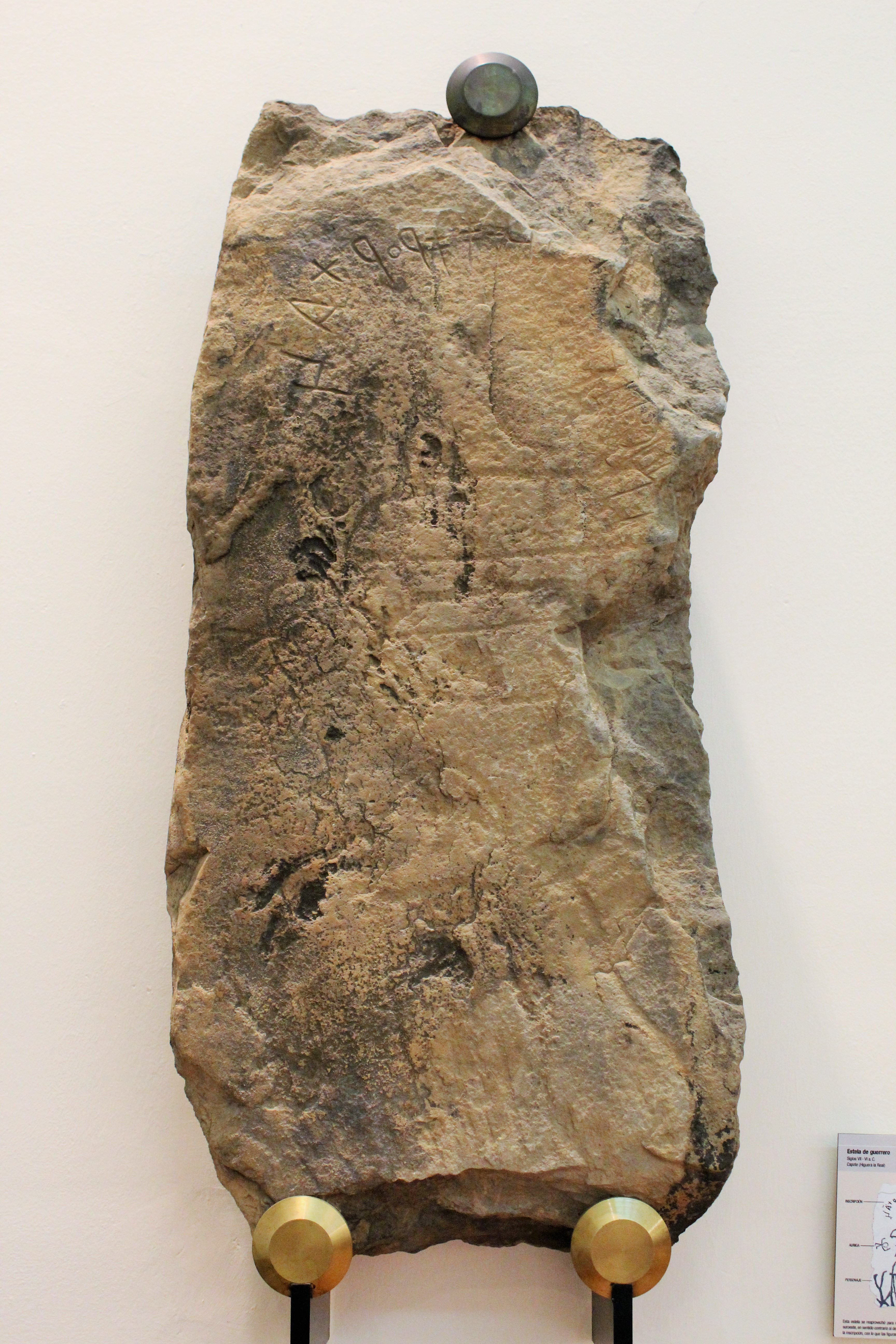 Protohistoria. Estela de guerrero. Siglo VII-VI a.C. Capote. Higuera la Real.